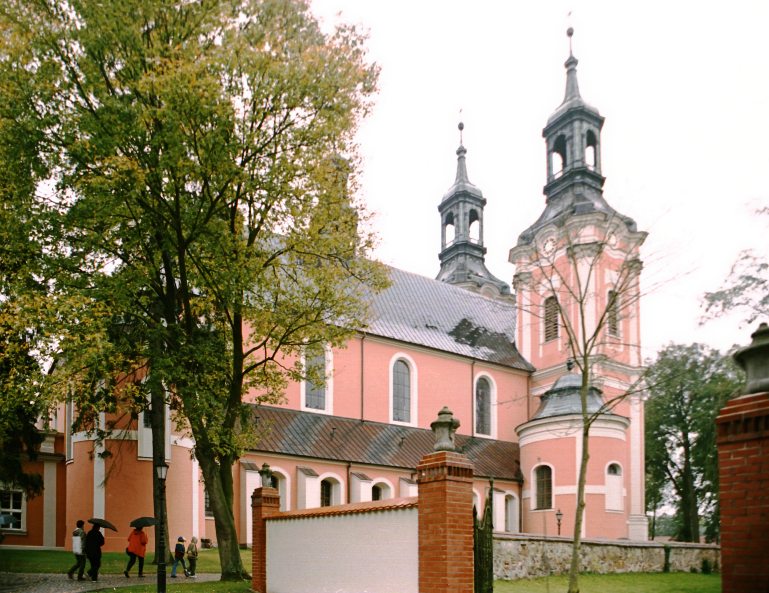 Gościkowo (-Paradyż), kościół pocysterski Wniebowzięcia NMP